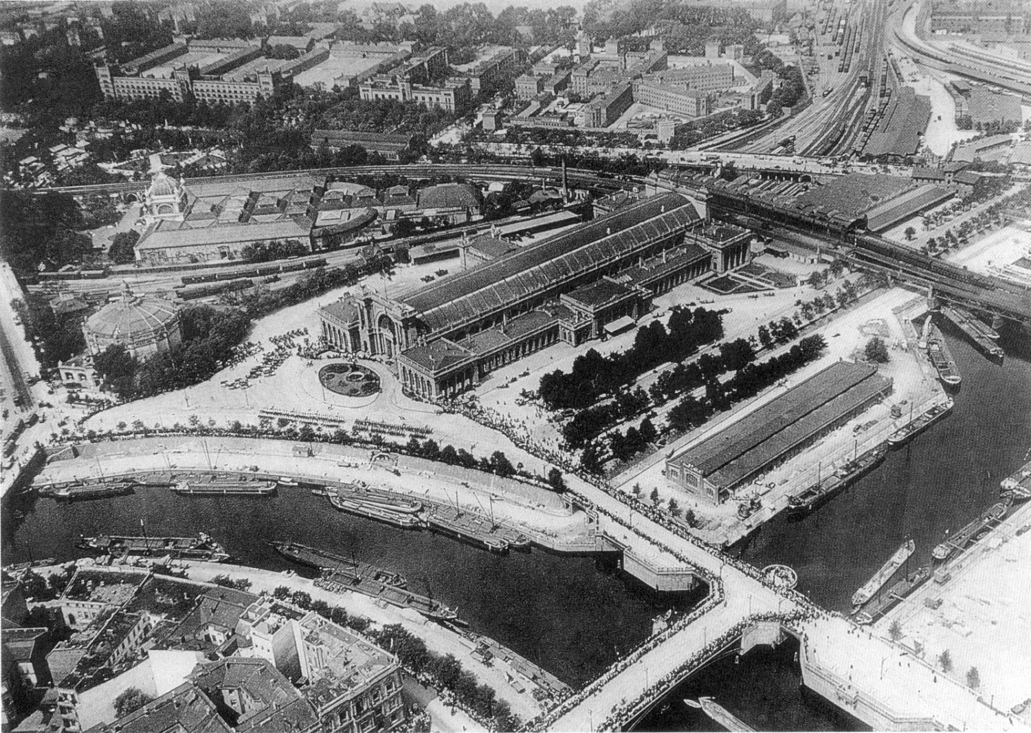 Der Lehrter Bahnhof. Darüber: Stadtbahnstrecke mit Lehrter Stadtbahnhof, Invalidenstraße und der sternförmige Bau des Zellengefängnisses Lehrter Straße. An der rechten Bildseite: Humboldthafen und ein Teil der (ersten) Humboldthafenbrücke, die Ende 2002 nach Fertigstellung des Berliner Hauptbahnhofs abgebaut wurde. Die Alsenbrücke (Mitte rechts unten) führt über die Spree zum Alsenviertel (links unten). Der Universum Landes-Ausstellungs-Park mit der Kuppel des 1883 gebauten Ausstellungspalastes ist links oben zu sehen. Der 1943 zerstörte Bau beherbergte ab 1936 die Deutsche Luftfahrtsammlung. Im 1892 gebauten „Marine-Panorama“, der Rundbau links vor dem Bahnhof, war von 1899 bis zu seiner Schließung 1915 das Deutsche Kolonialmuseum. aerial view of Berlin railway station Lehrter Bahnhof at the site of today's Hauptbahnhof, with river Spree and Humboldthafen, around 1910. At the middle left: Ausstellungspalast (Universum Landes-Ausstellungs-Park)